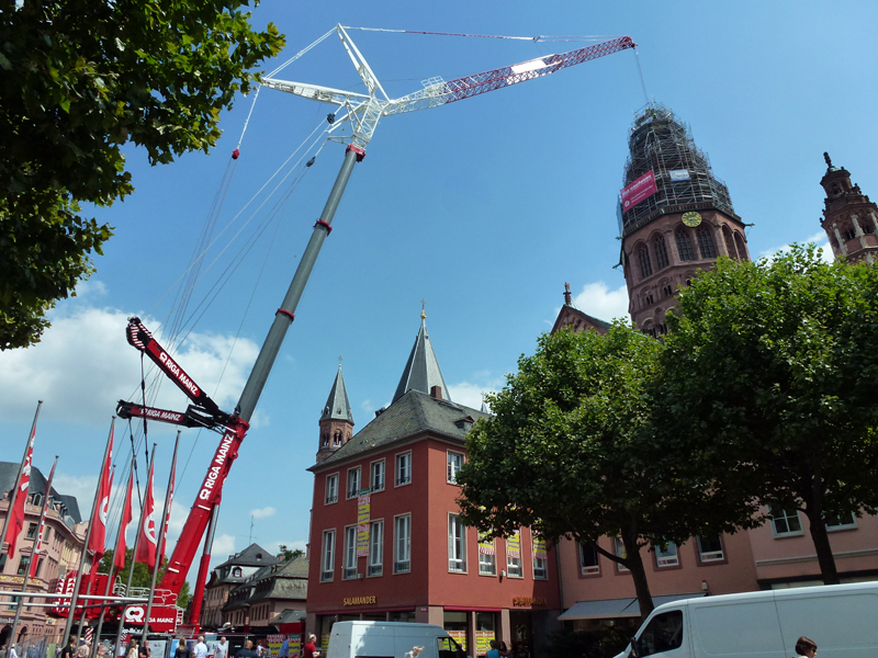 Einsatz des neuen Riga Kran (Liebherr LTM 1750-9.1) am Mainzer Dom während der Sanierung 2013.